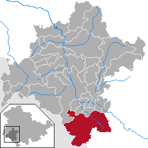 Grabfeld in Thuringia - District Schmalkalden-Meiningen